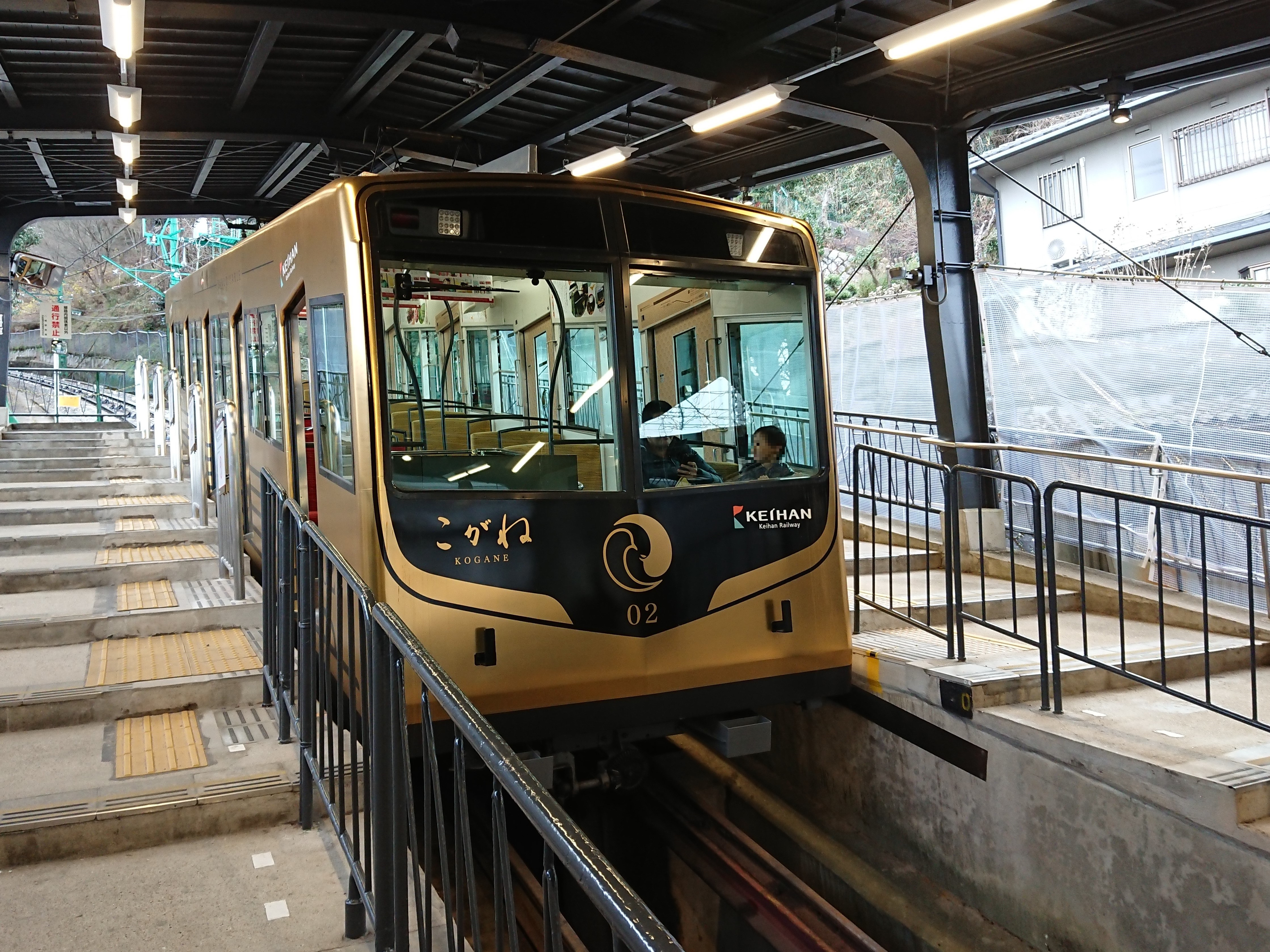 京阪鋼索線(石清水八幡宮参道ケーブル)の客車「こがね」 ケーブル八幡宮口駅にて撮影（京都府八幡市）